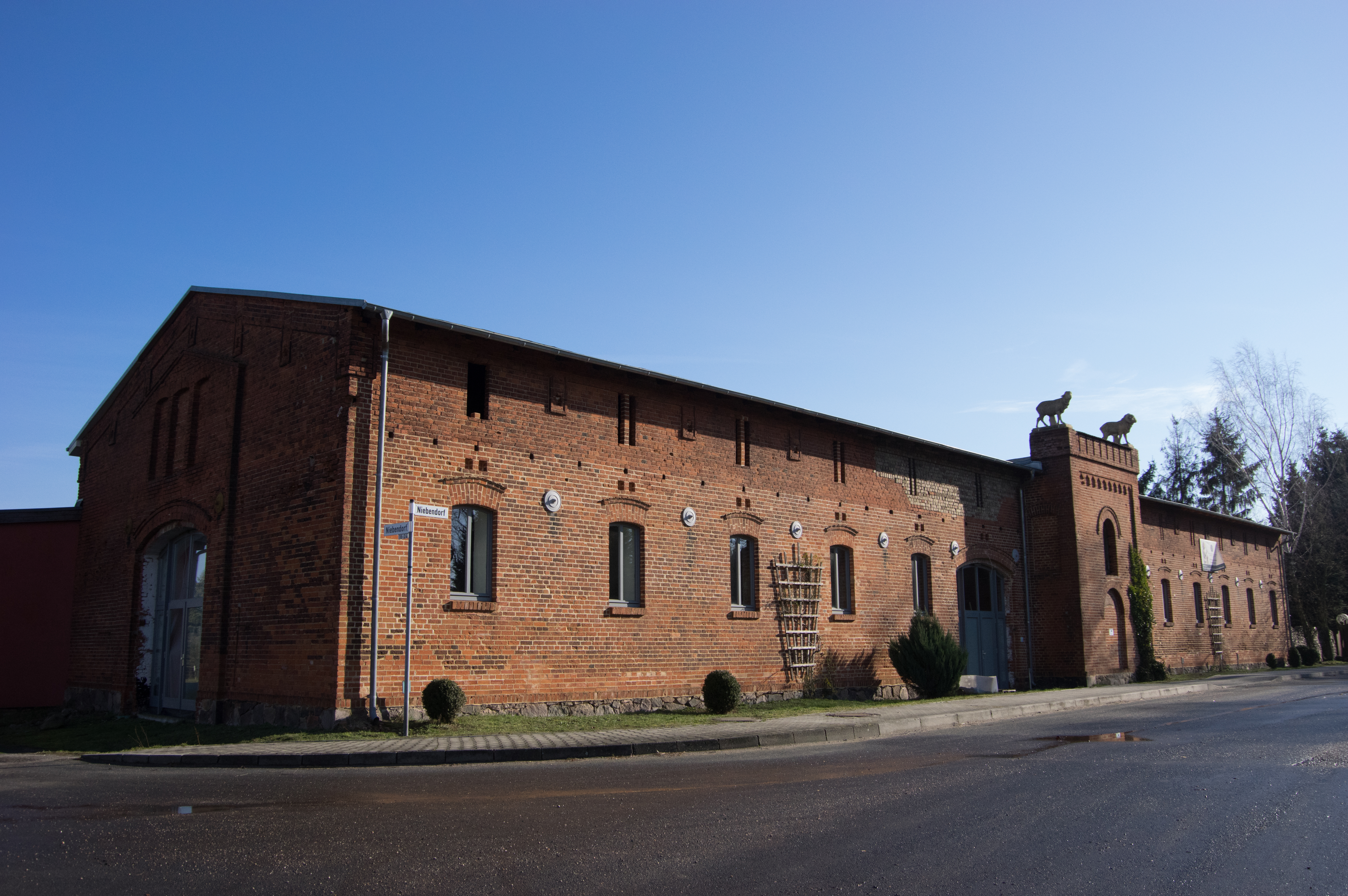 Dahme/Mark, Ortsteil Niebendorf in Brandenburg. Der Schafstall steht unter Denkmalschutz.